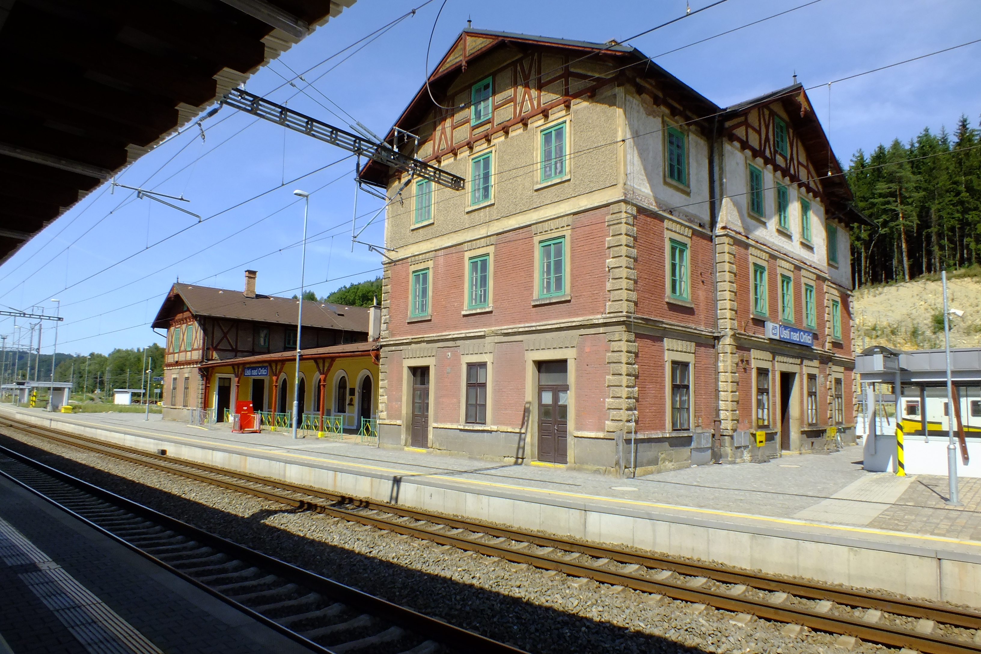 Nadražní budova ve stanici